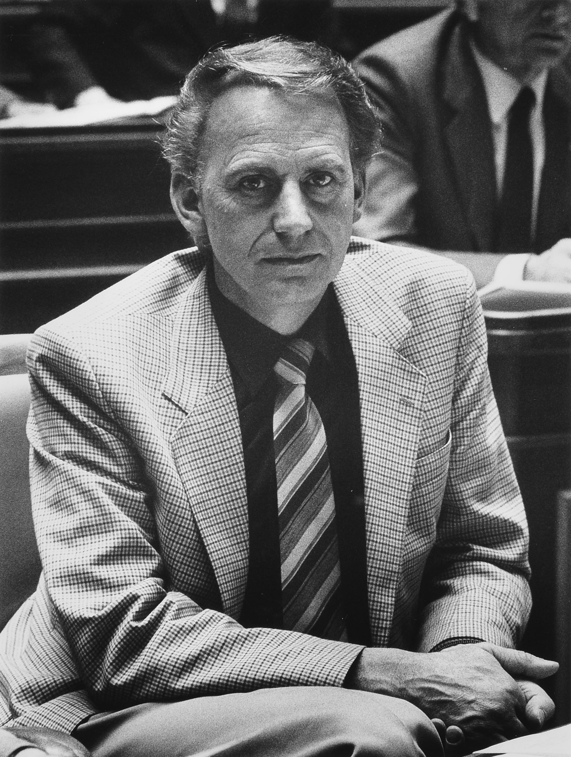 Porträt Nationalrat Dr. Andreas Müller